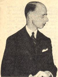 Eelco Nicolaas van Kleffens